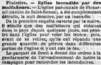 L'incendie de l'église paroissiale de Plouarzel dans la nuit du 11 au 12 août 1898 (journal La Croix du 13 août 1898). Contrairement à ce qu'affirme cet article, ce ne sont pas des malfaiteurs (quatre vagabonds furent pourtant un temps arrêtés) qui mirent le feu à l'église, mais le bedeau.